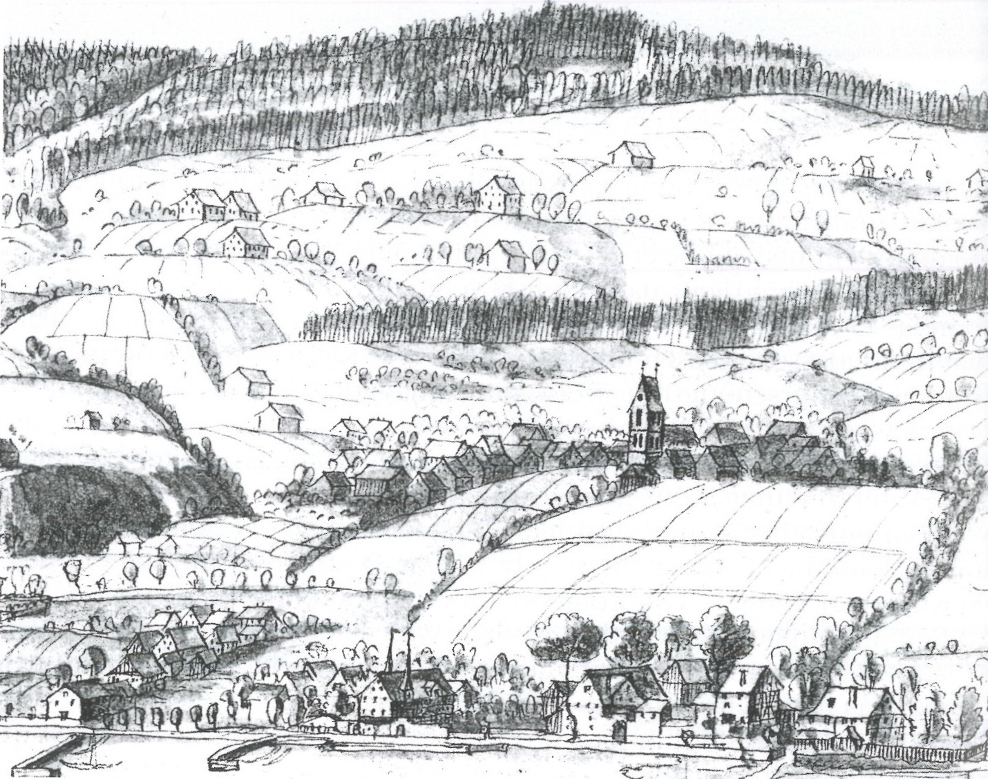 Zollikon um 1771, Zeichnung von Johann Jakob Hofmann